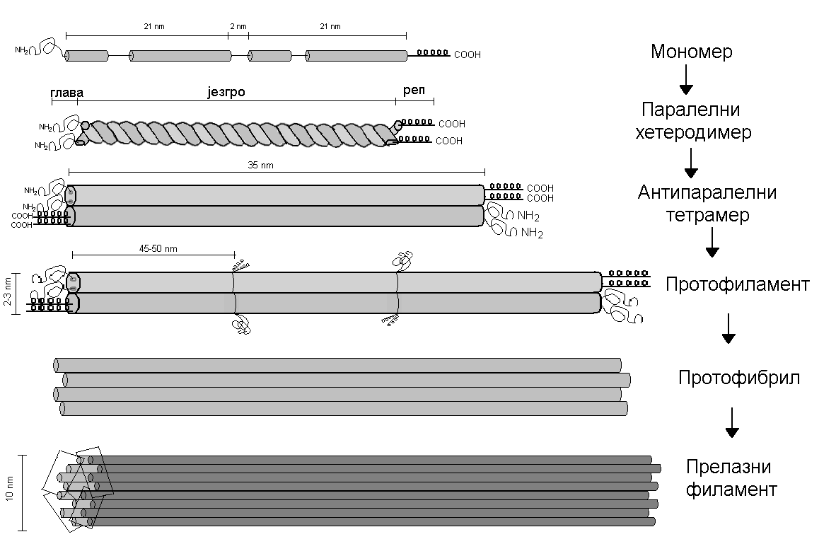 Грађа прелазних филамената. Настала на основу слике из "Скрипте из цитологије; Анимални део 2" стр. 10; др. Радмила Глишић